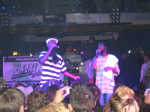 Die Ying Yang Twins auf einem Gig am 06.05.2007 in der Discothek Halifax, Himmelkron